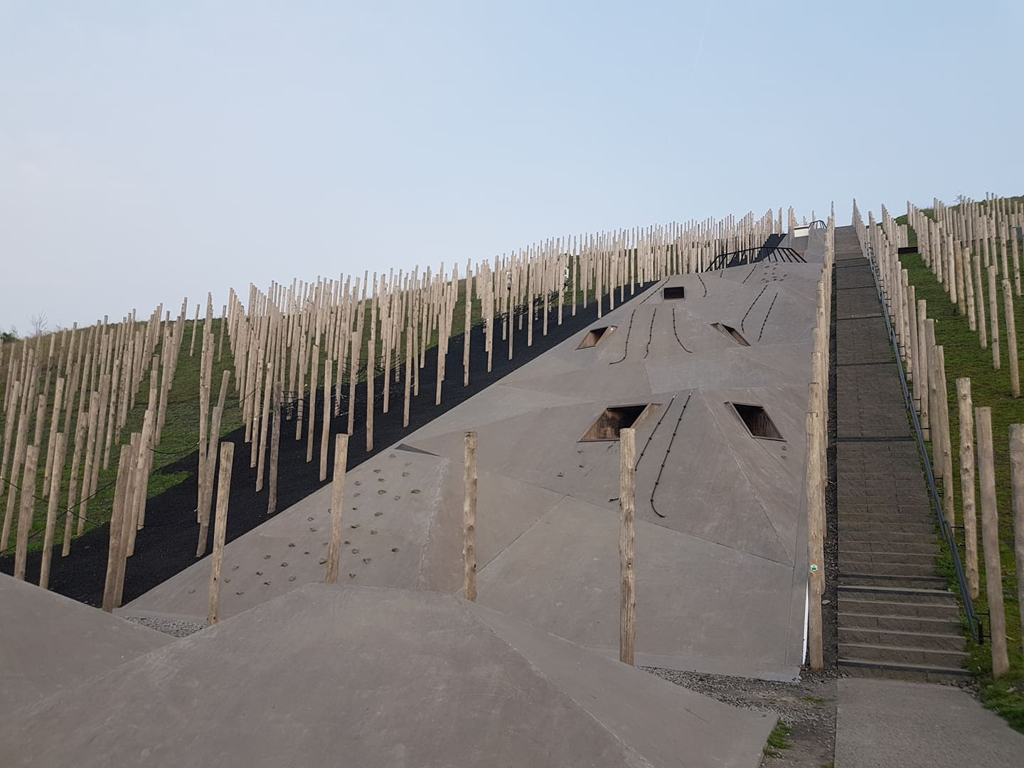 Een close-up van de Avonturenberg in Beringen.